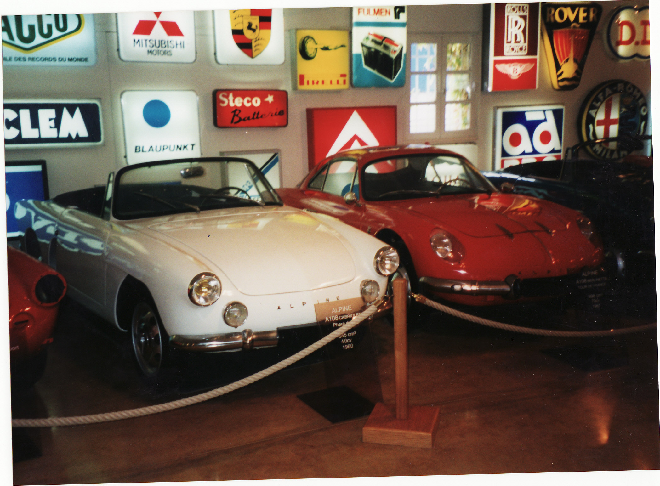 Alpine-Renault A106 Cabriolet and A108 Berlinette c.1960